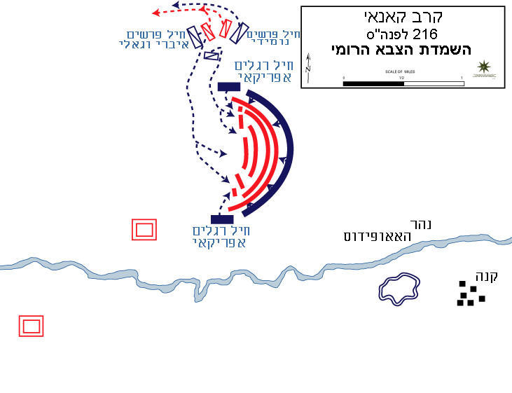 מפה המתארת את השמדת הצבא הרומי בhe:קרב קאנאי